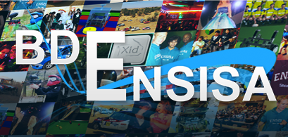 Logo du BDE de l'ENSISA sur fond mosaïque des activités de l'école.